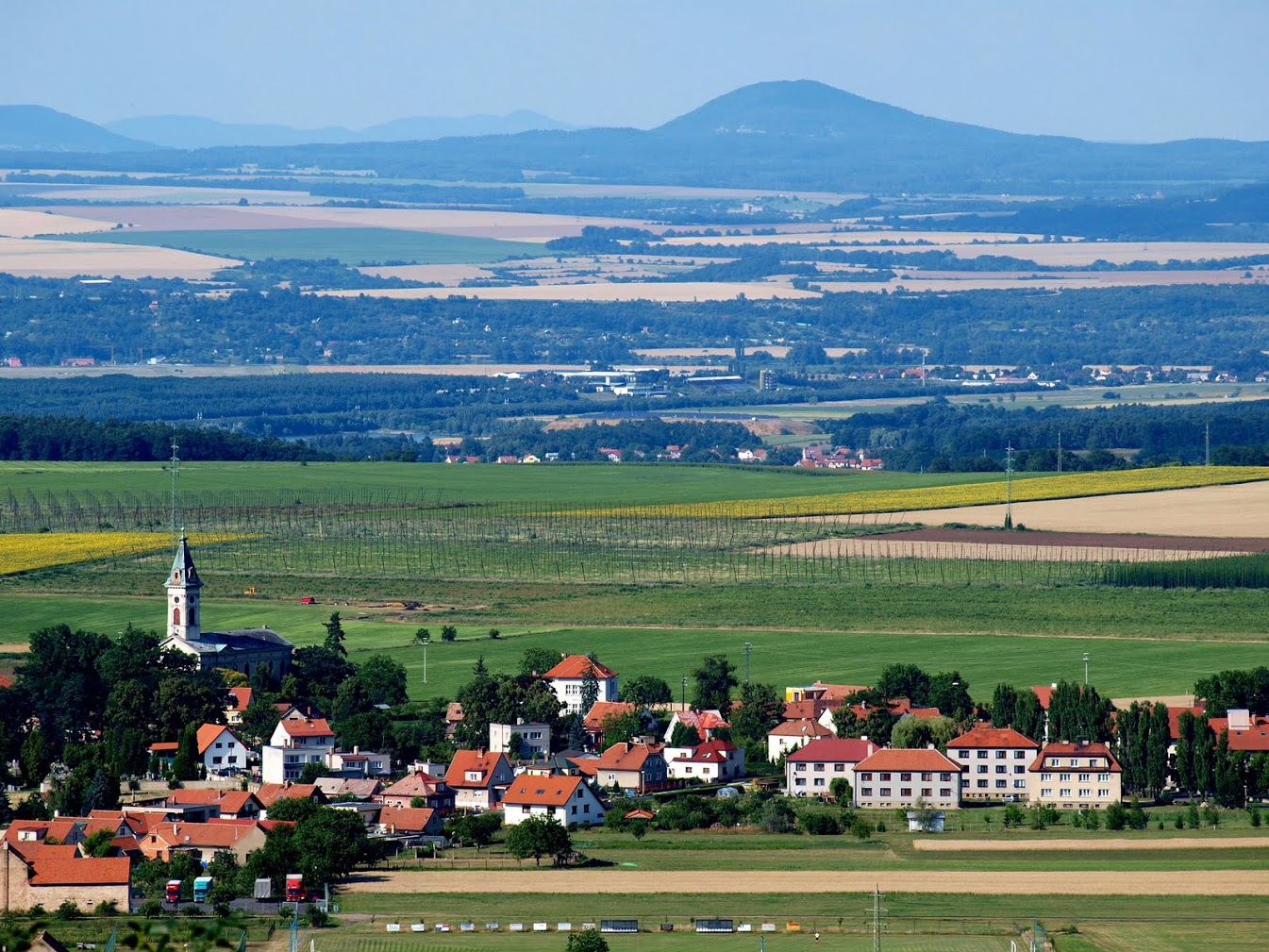 Krabčice